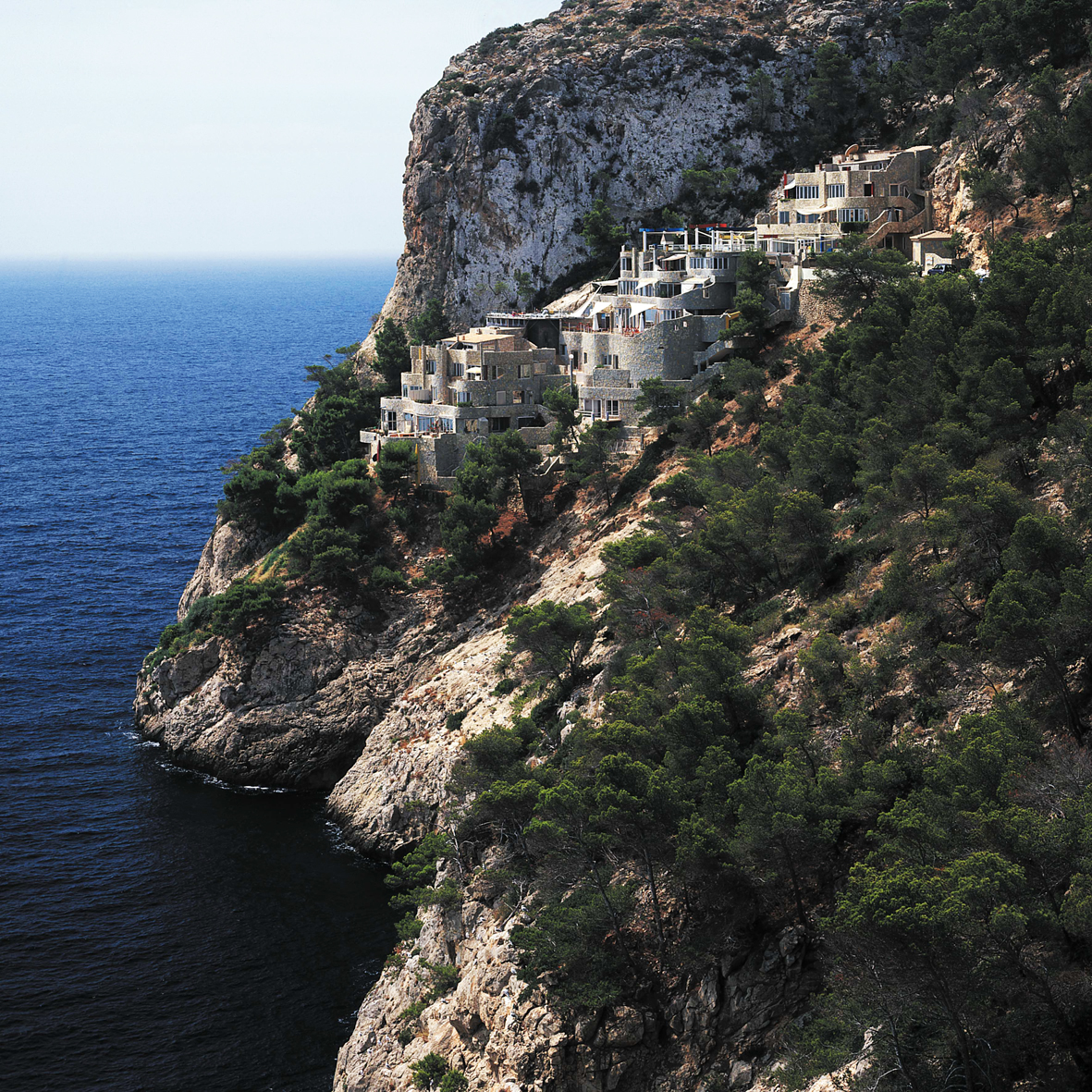 El edificio del museo, las manifestaciones expresadas a través de las obras de arte y el entorno deben entrar en una simbiosis única según el concepto del artista. El museo está dividido en niveles que contienen tanto pinturas, como obras escultóricas. Cabe destacar que la colección de esculturas se distribuye por toda el área , tanto en el exterior como en el interior.